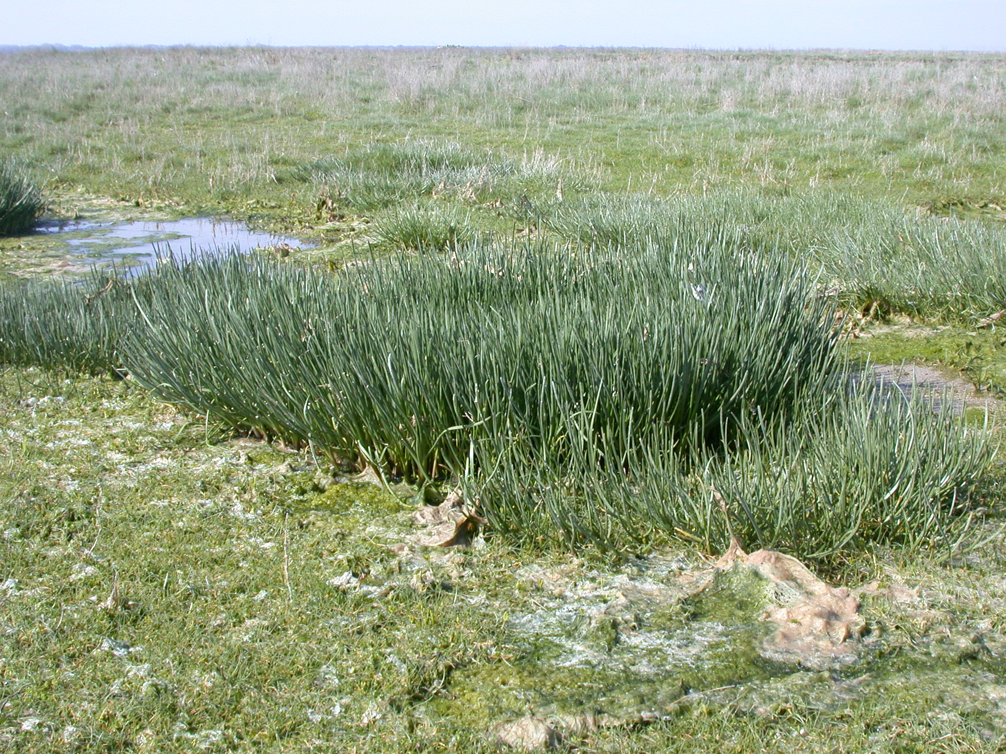 Triglochin maritima Baie d'Authie Nord (Somme), France